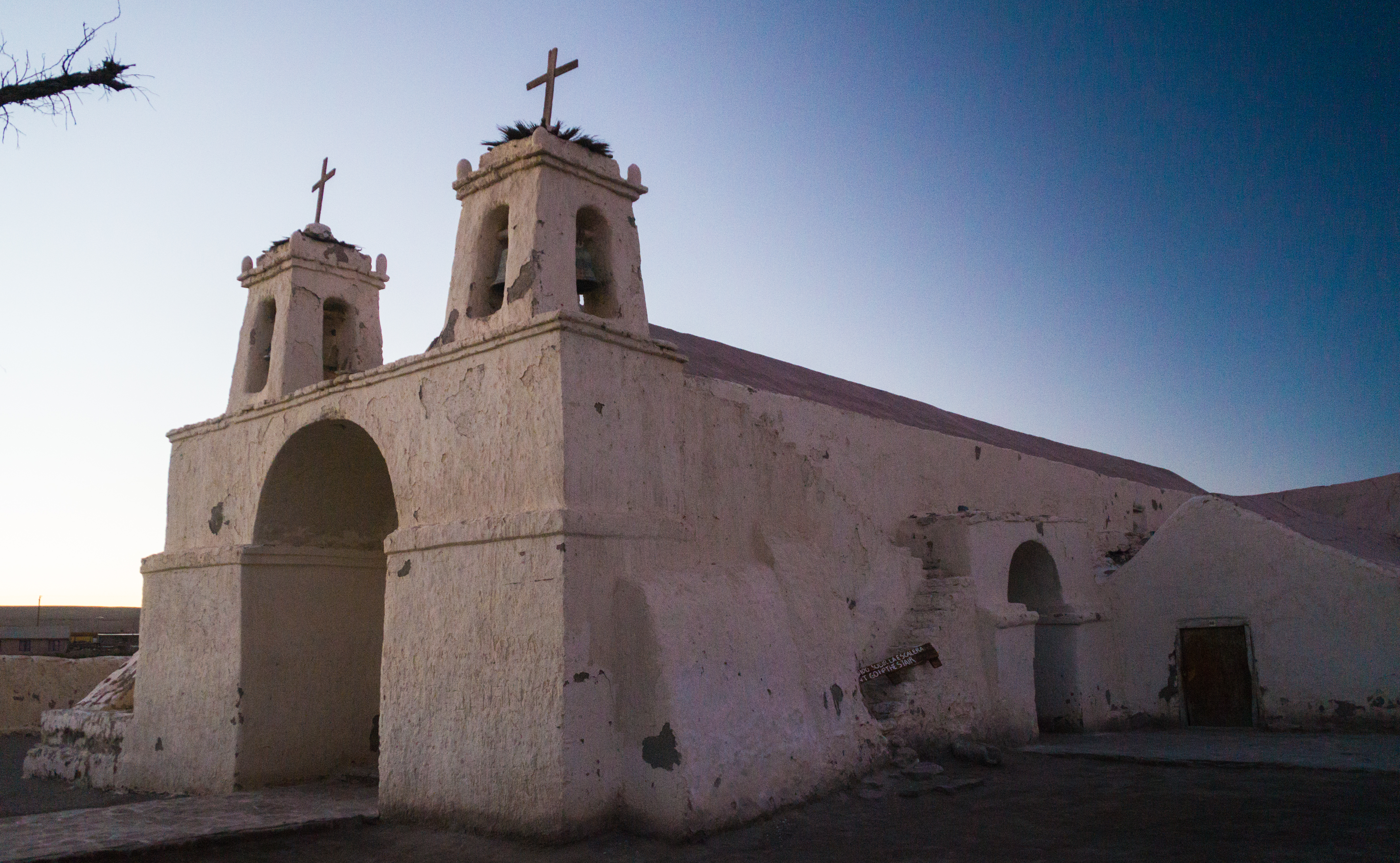 Iglesia de San Francisco de Chiu Chiu al atardecer. This is a photo of a national monument in Chile: 541